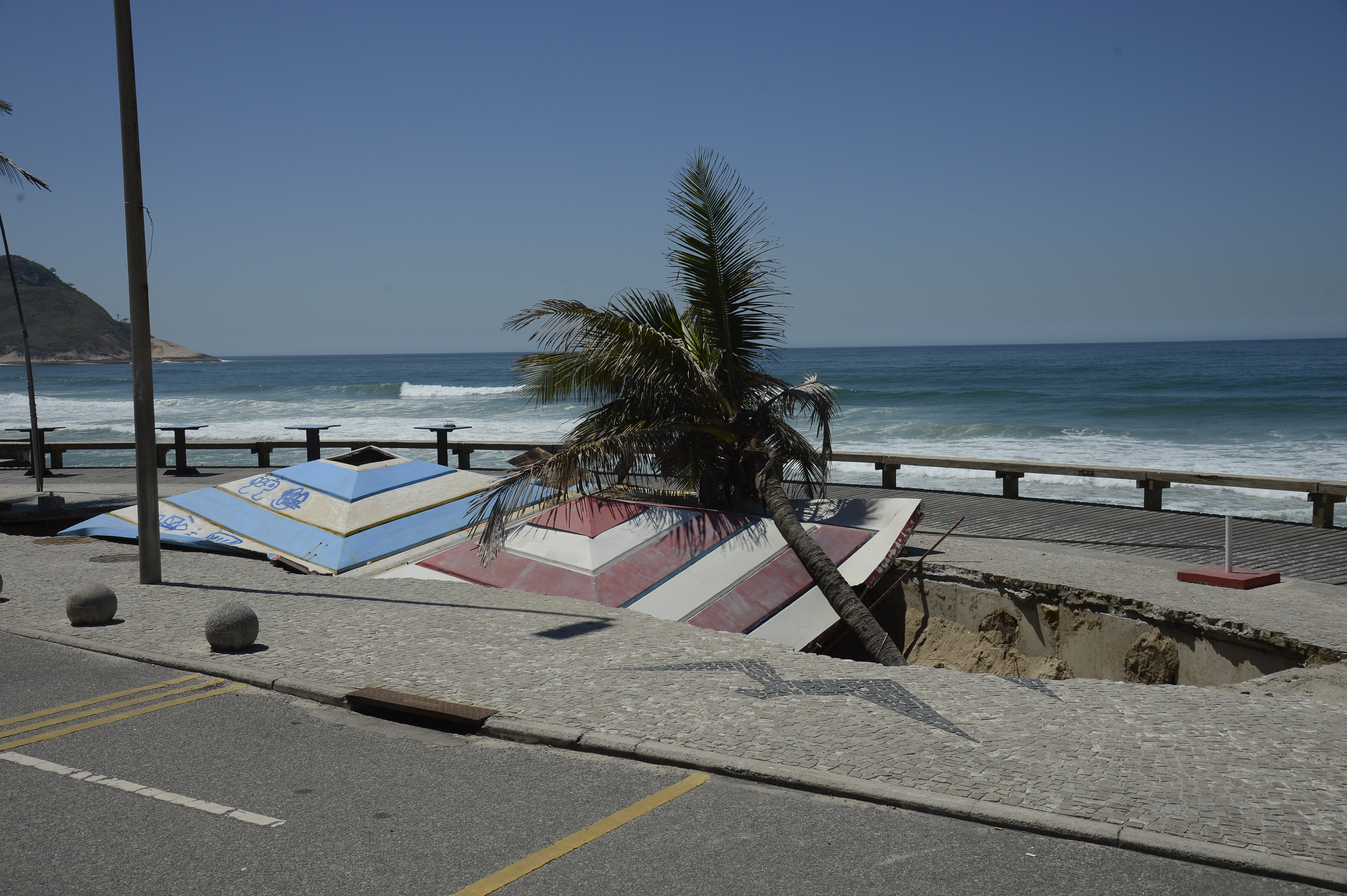 Rio de Janeiro - Desmoronamento de trecho da orla da Praia da Macumba, no Recreio dos Bandeirantes, zona oeste do Rio de Janeiro (Tomaz Silva/Agência Brasil)